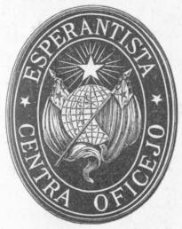 Insigno de Centra Oficejo Esperantista, 1908 (Oficiala Gazeto Esperantista)